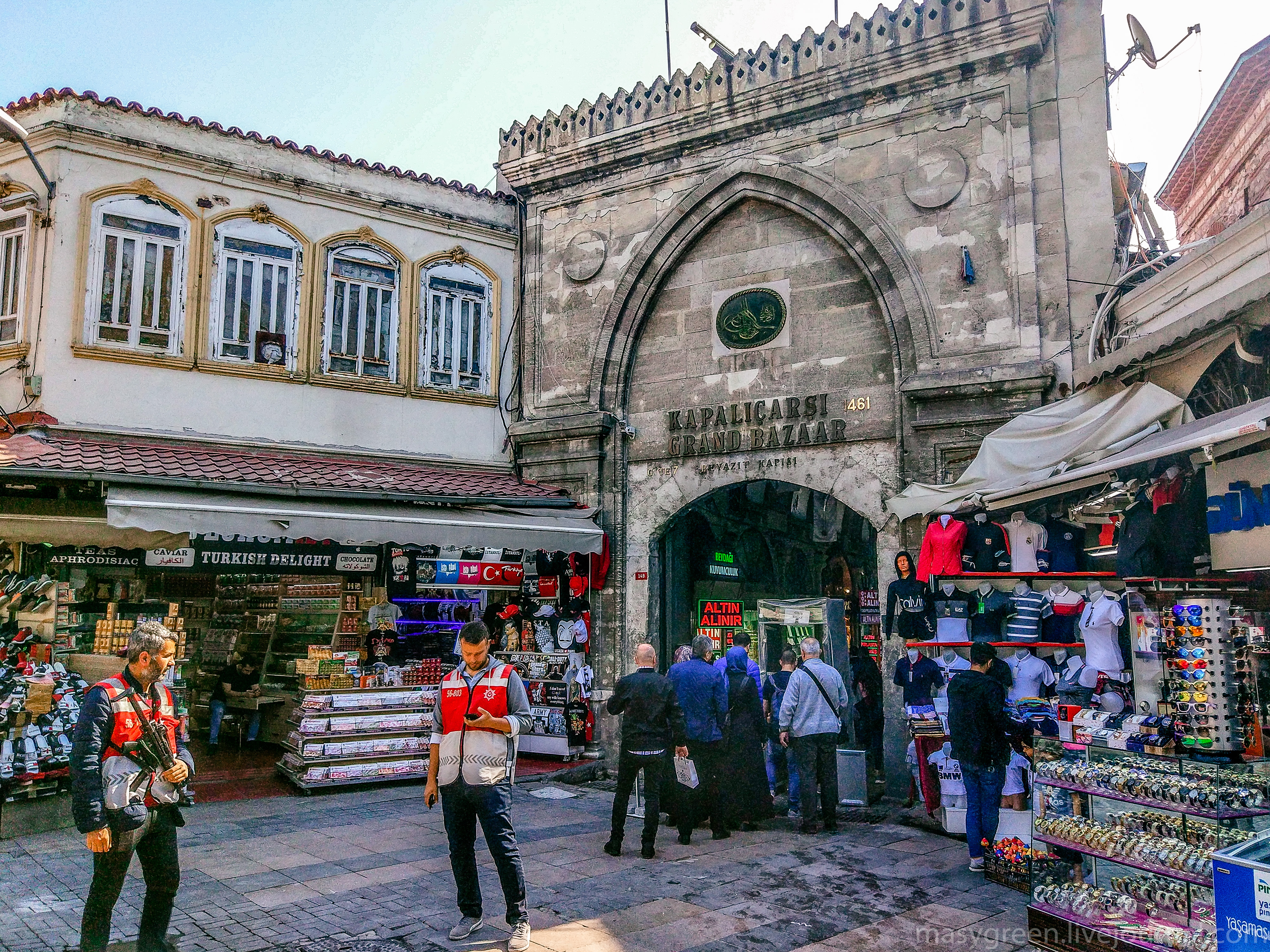 Ворота Beyazıt